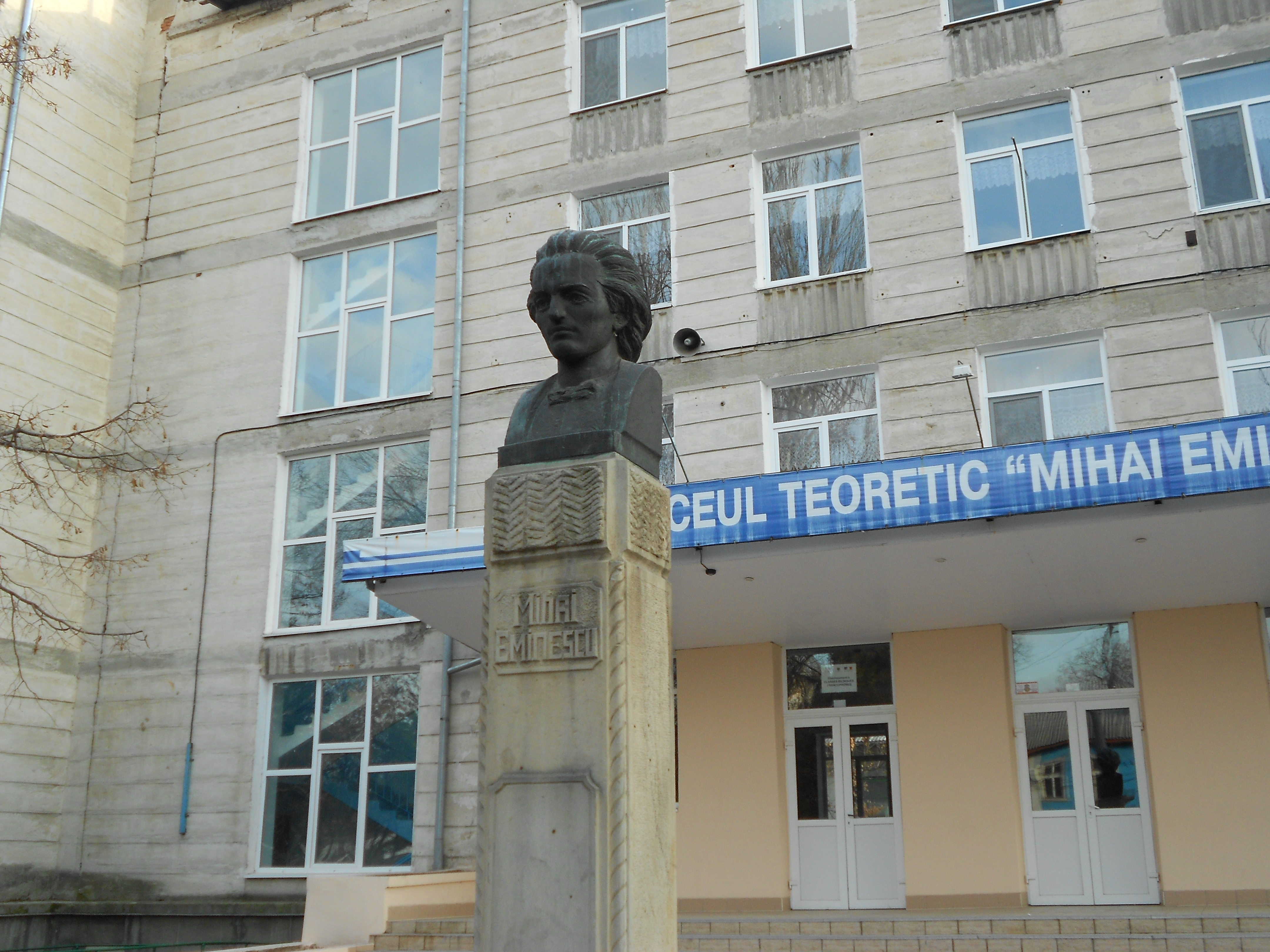 Bustul lui Mihai Eminescu din curtea Liceului Teoretic “M. Eminescu”, Bălți